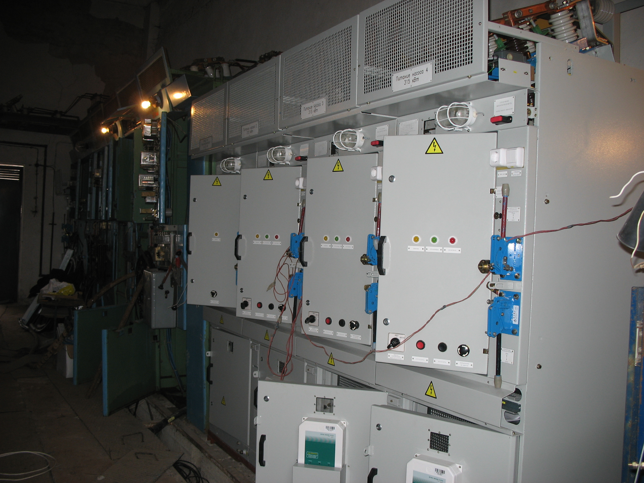 Камеры КСО